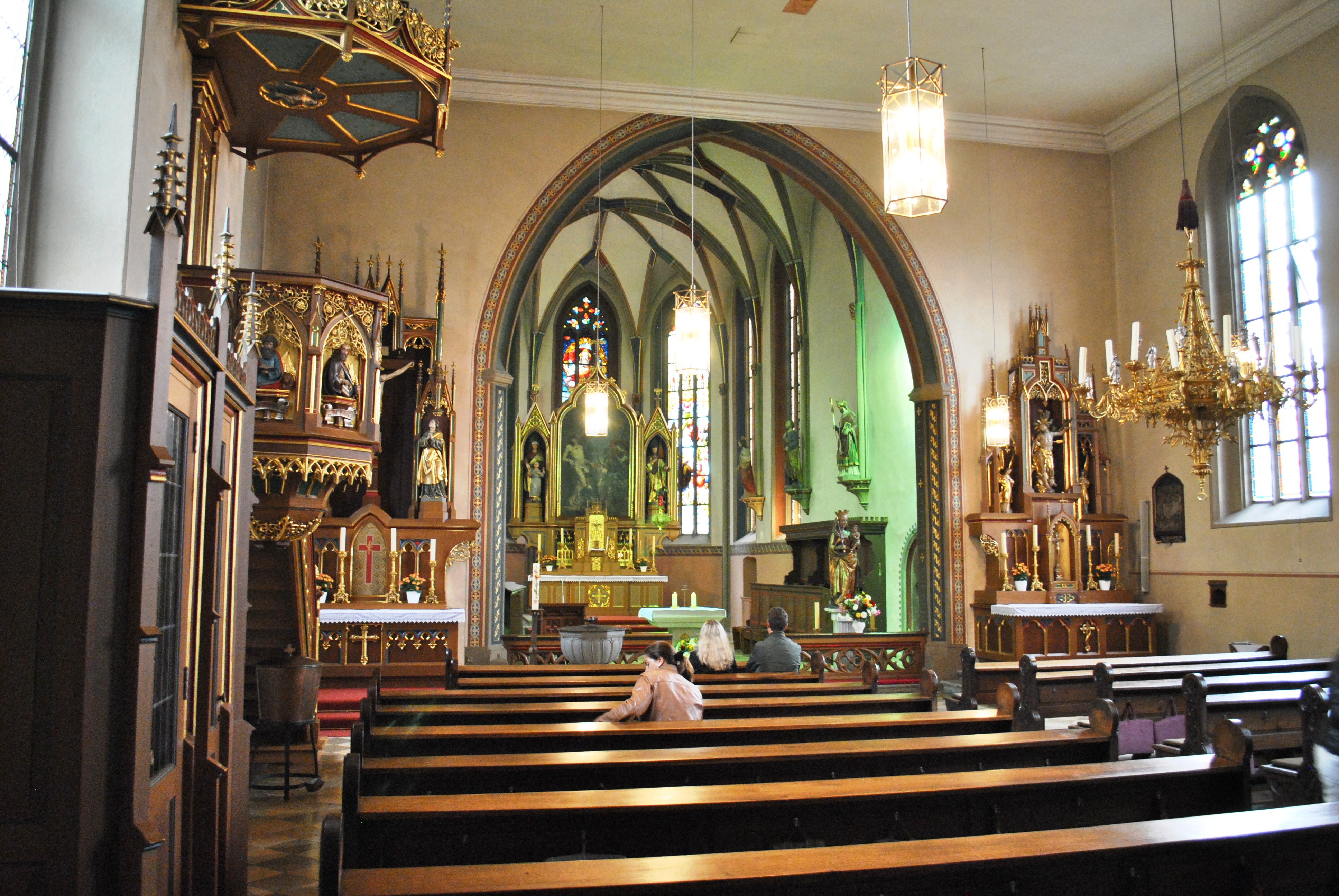 Katholische Pfarrkirche St. Sebastian Chor, Turm und Sakristei 1482, Langhaus um 1602 verändert; mit Ausstattung. Am Außenbau Epitaphien, 1602 und um 1700.This is a photograph of an architectural monument.